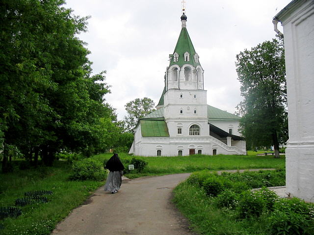 Androvskaya Sloboda (in Russian city Aleksandrov)